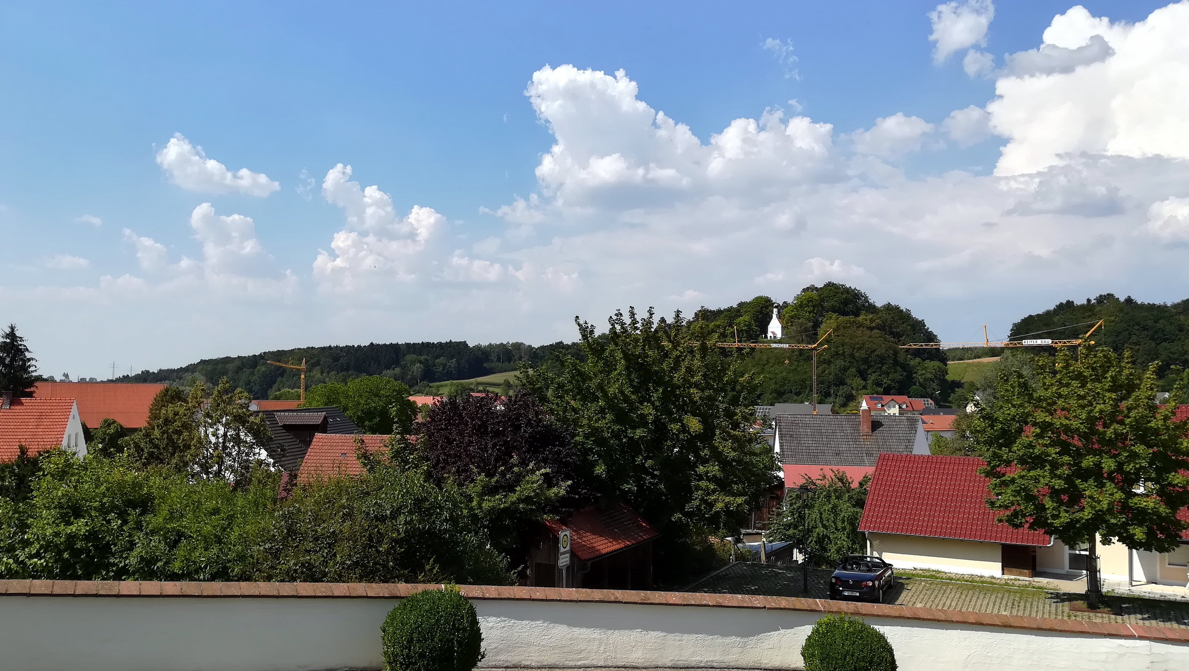 Rottenegg ist eine ehemalige Gemeinde in der Hallertau.